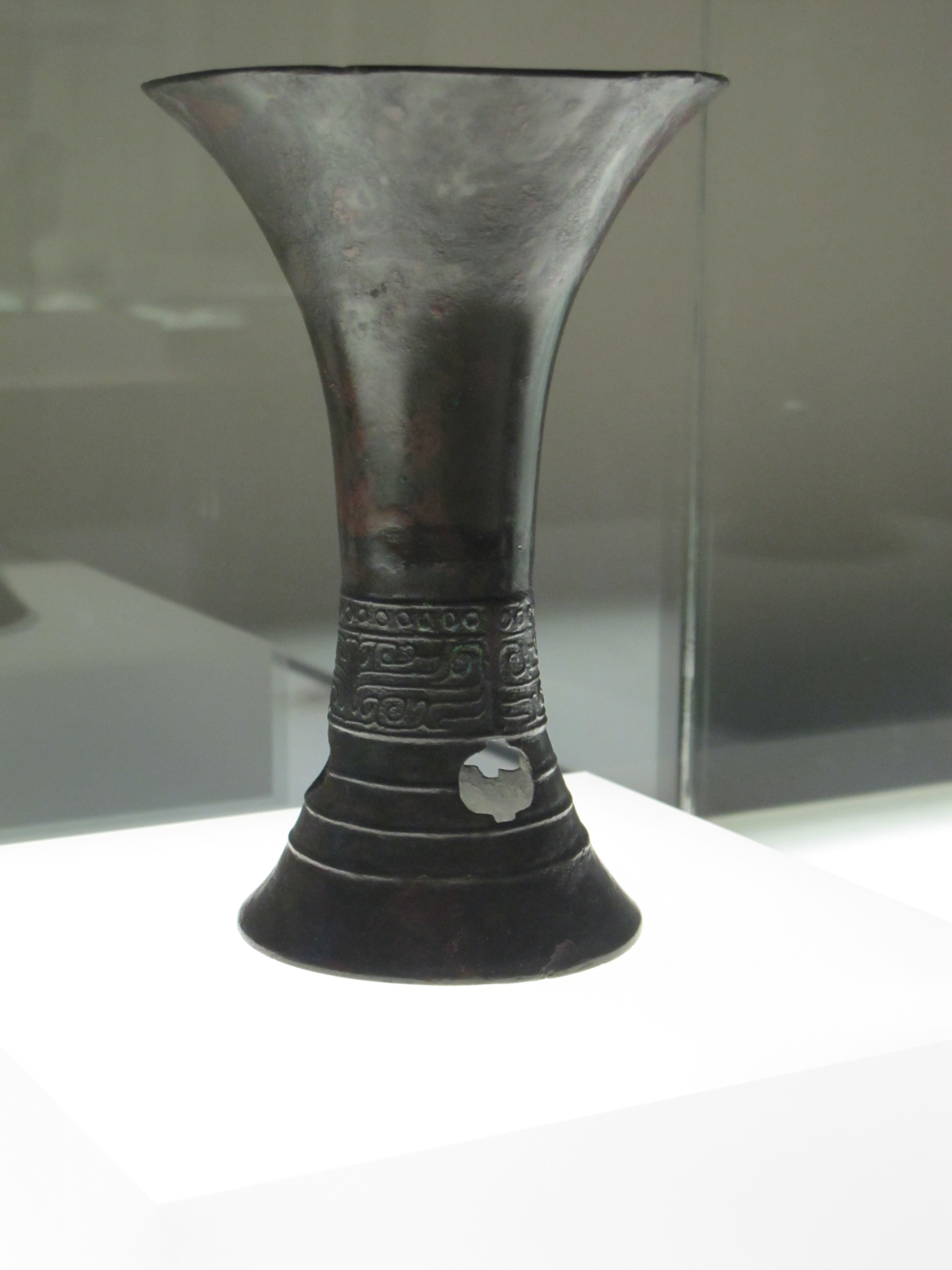 Vase gu pour le vin et les boissons fermentées. Bronze. Époque de Erligang (vers 1550 – vers 1300 avant notre ère). Dynastie des Shang (vers 1550 – vers 1050 avant notre ère). M.C. 83 Legs Henri Cernuschi, 1896. Musée Cernuschi, Paris.